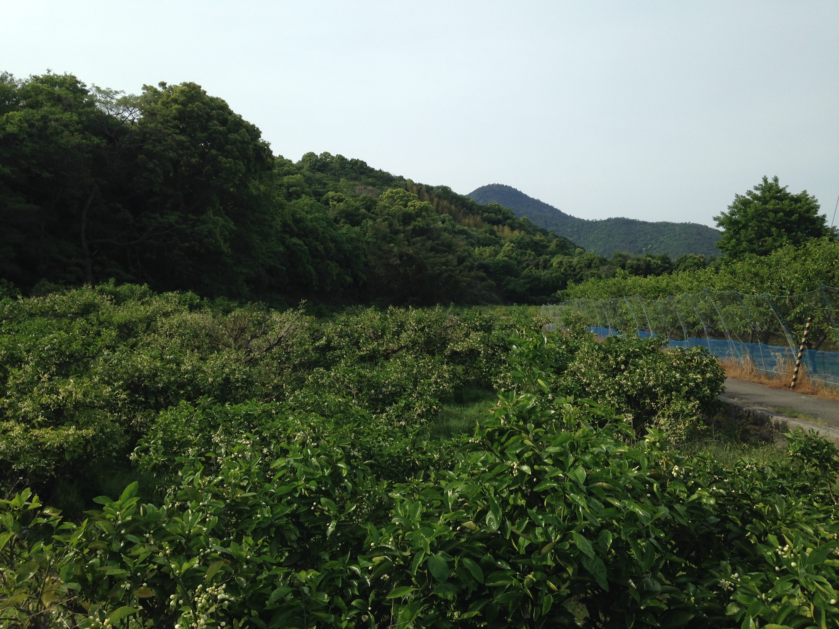 徳島県鳴門市大麻町桧のスダチ果樹園と大麻山